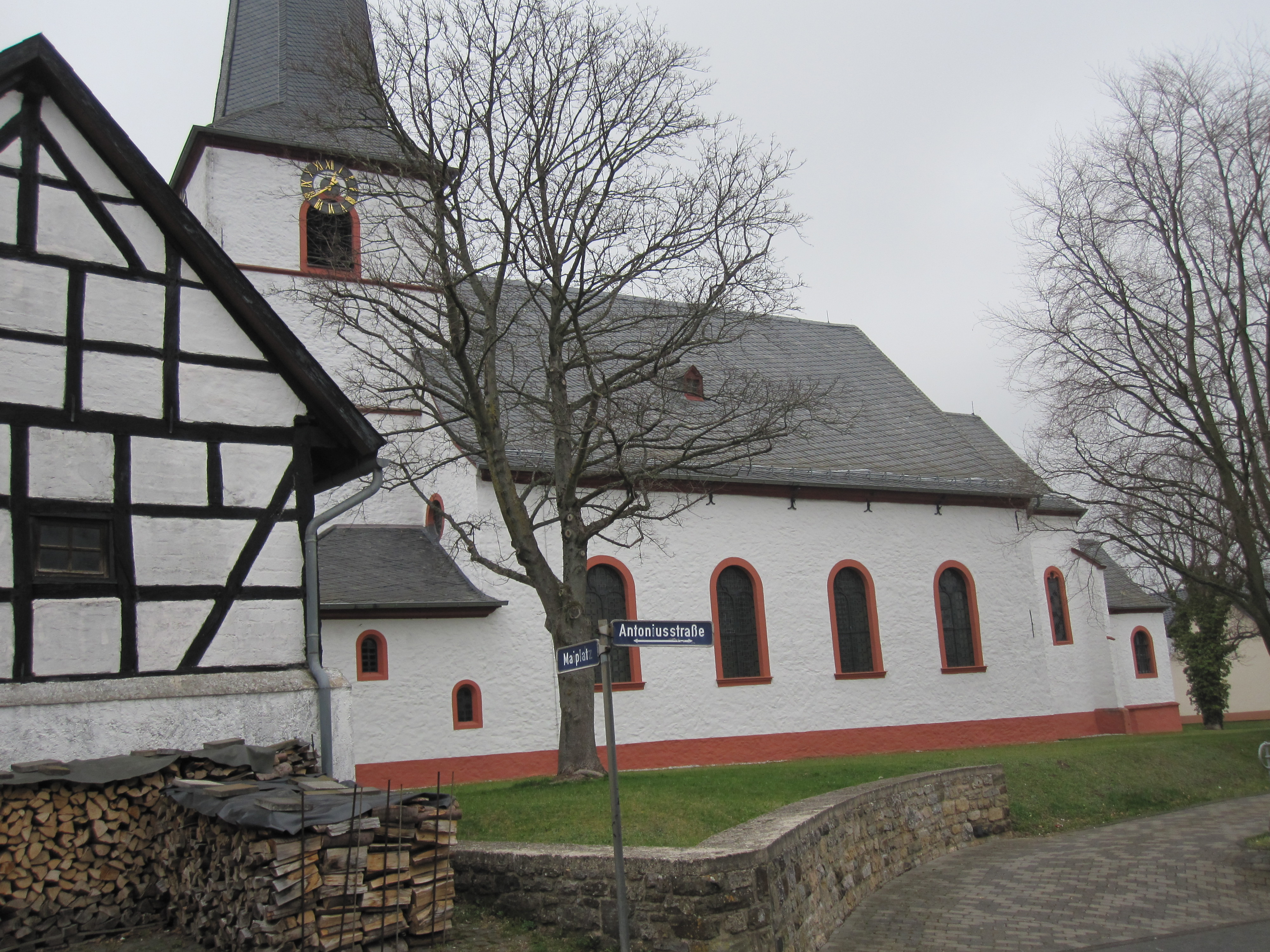 Katholische Pfarrkirche St. Johann Baptist in Dollendorf